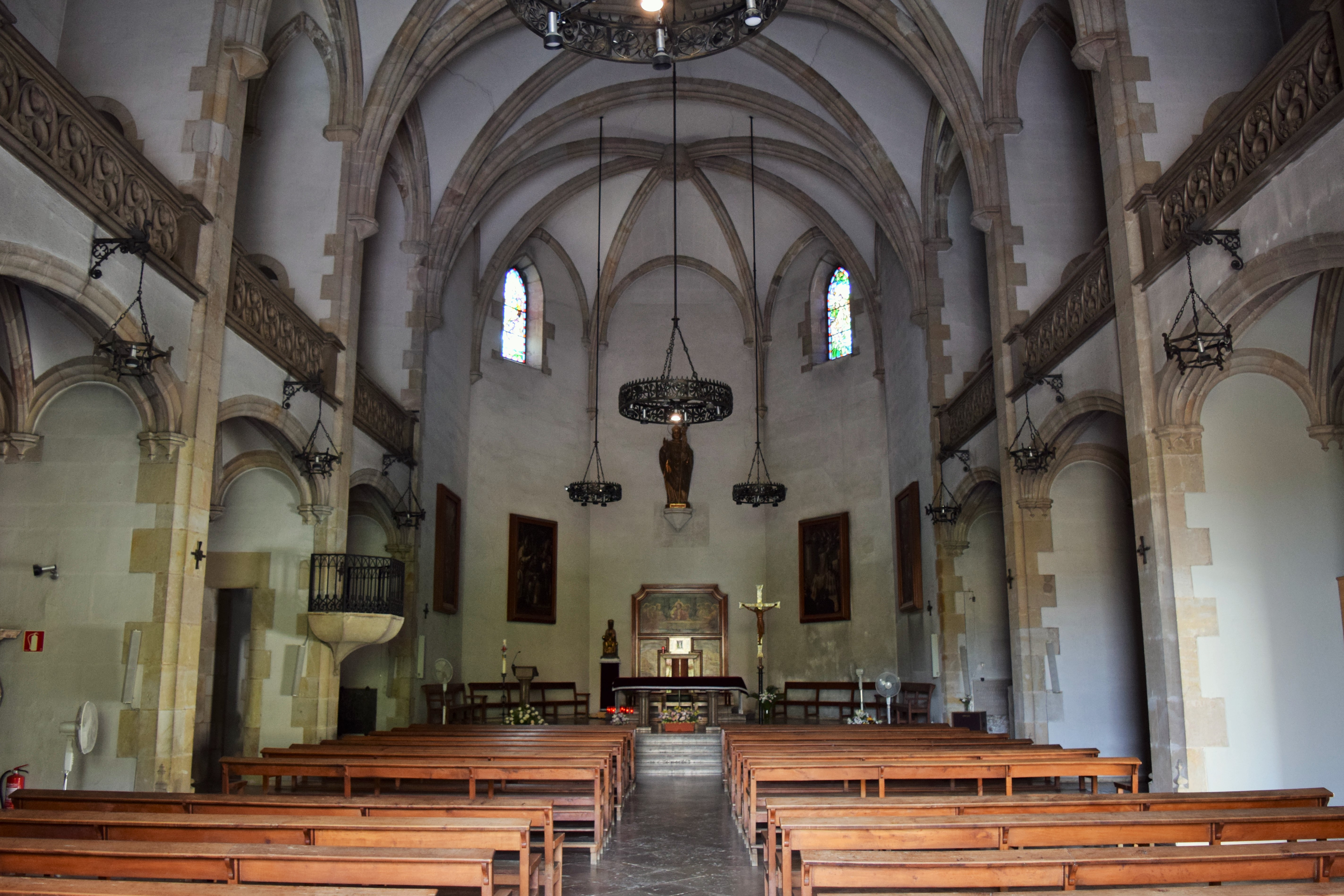 Església parroquial de Sant Martí de Teià